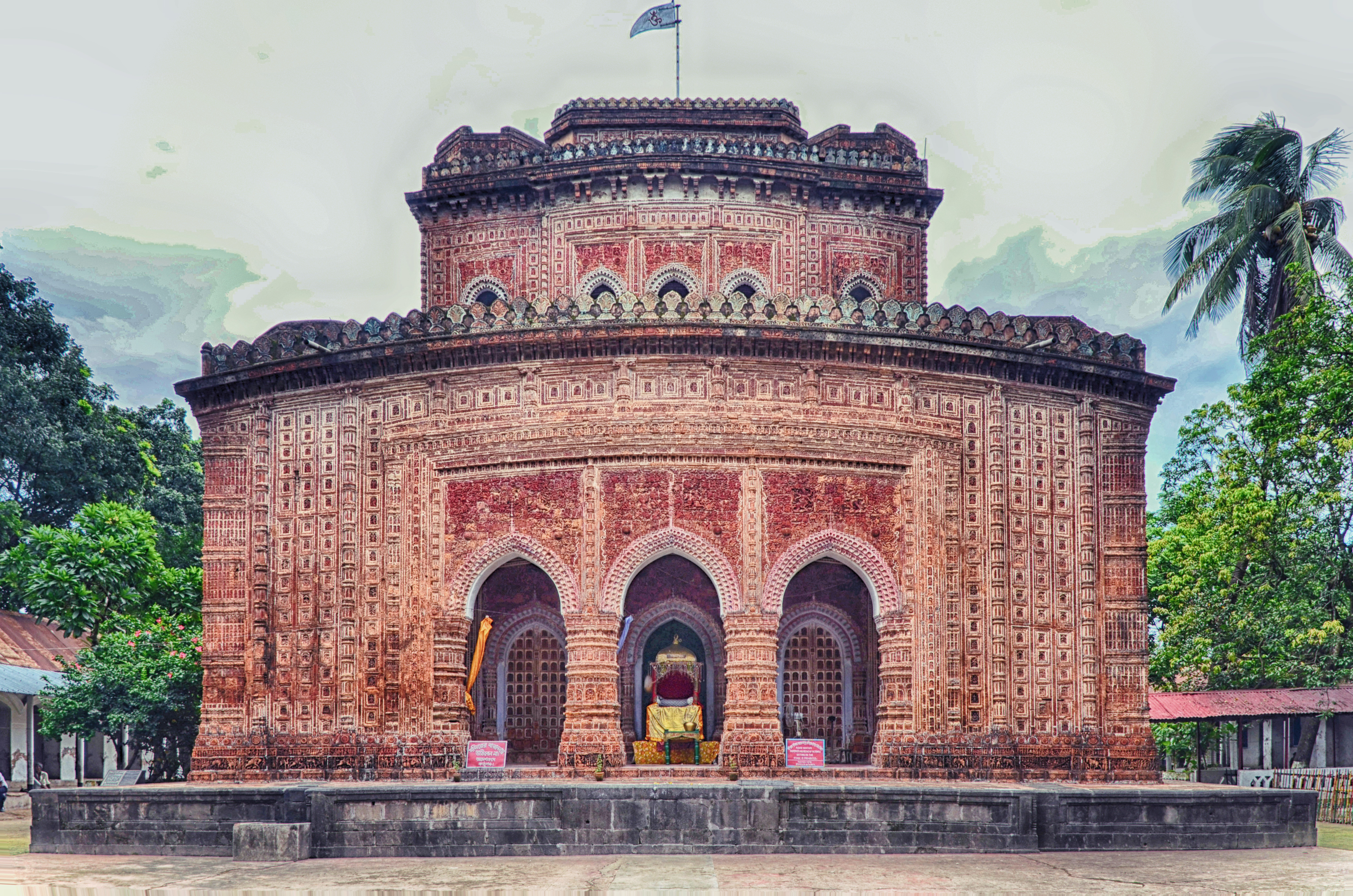 কান্তনগর মন্দির